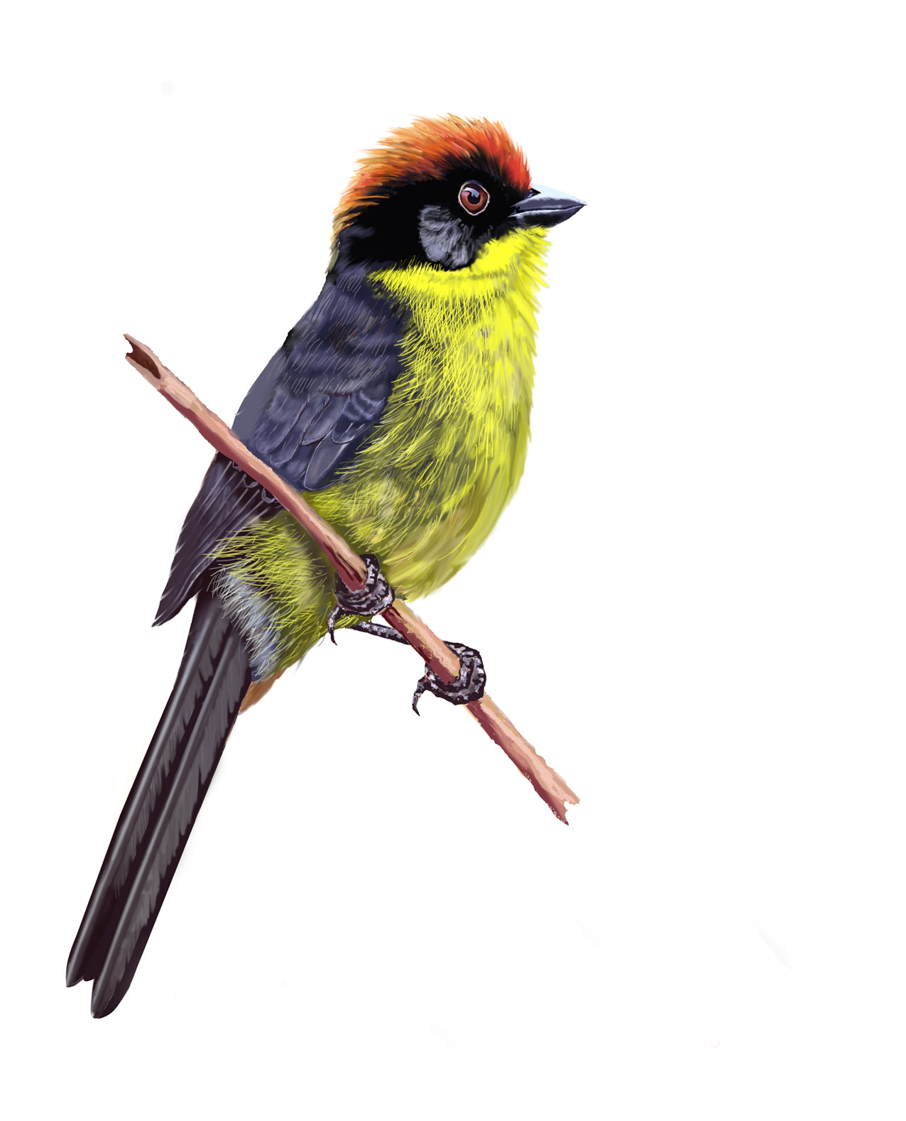 Ilustración digital por Benjamín Cárdenas Valderrama 2007